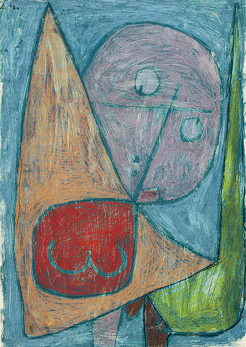 Paul Klee: Engel, noch weiblich, Kreide auf Grundierung auf Papier auf Karton, 41,7 x 29,4 cm, Zentrum Paul Klee, Bern